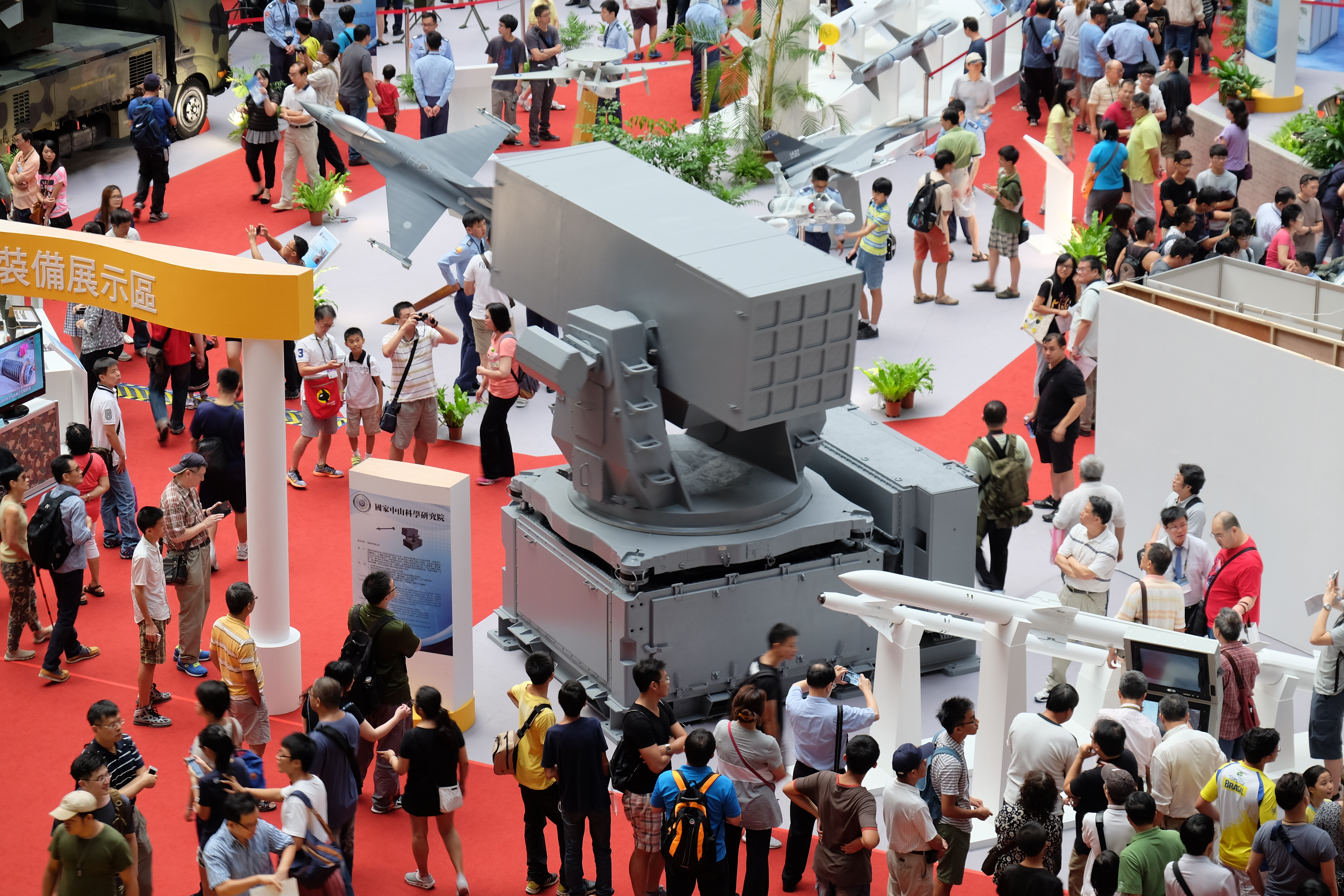 2015台北國際航太暨國防工業展覽會第三日，國防館展示的海劍羚系統左後方俯覽。